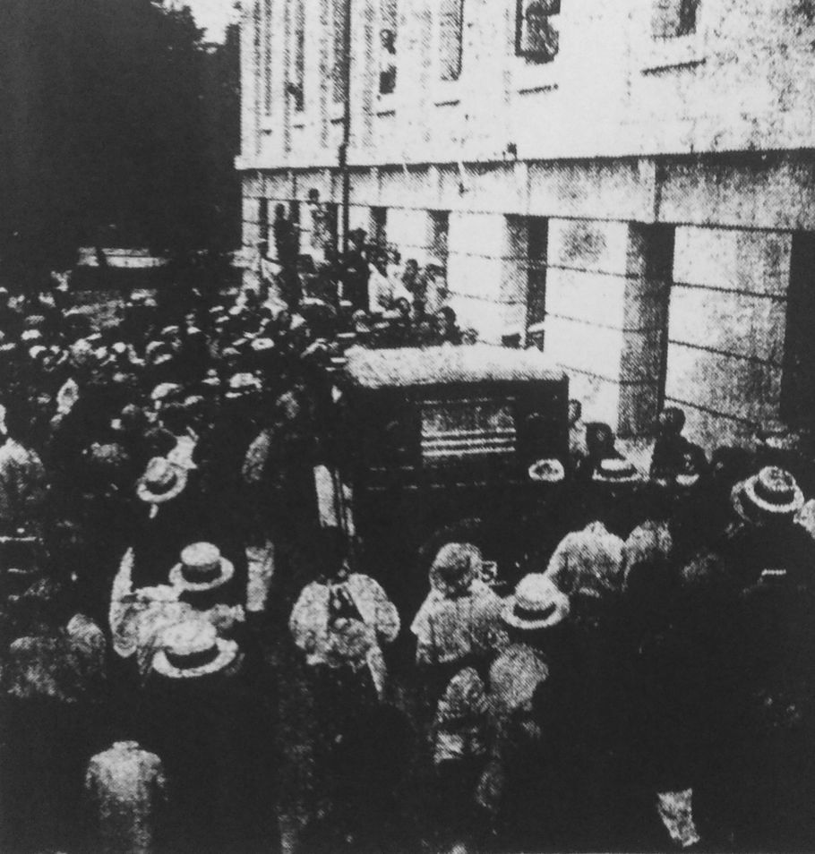 小笛裁判の見物人